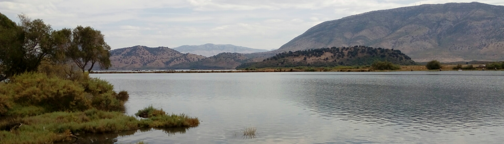 Butrinti, Sarande